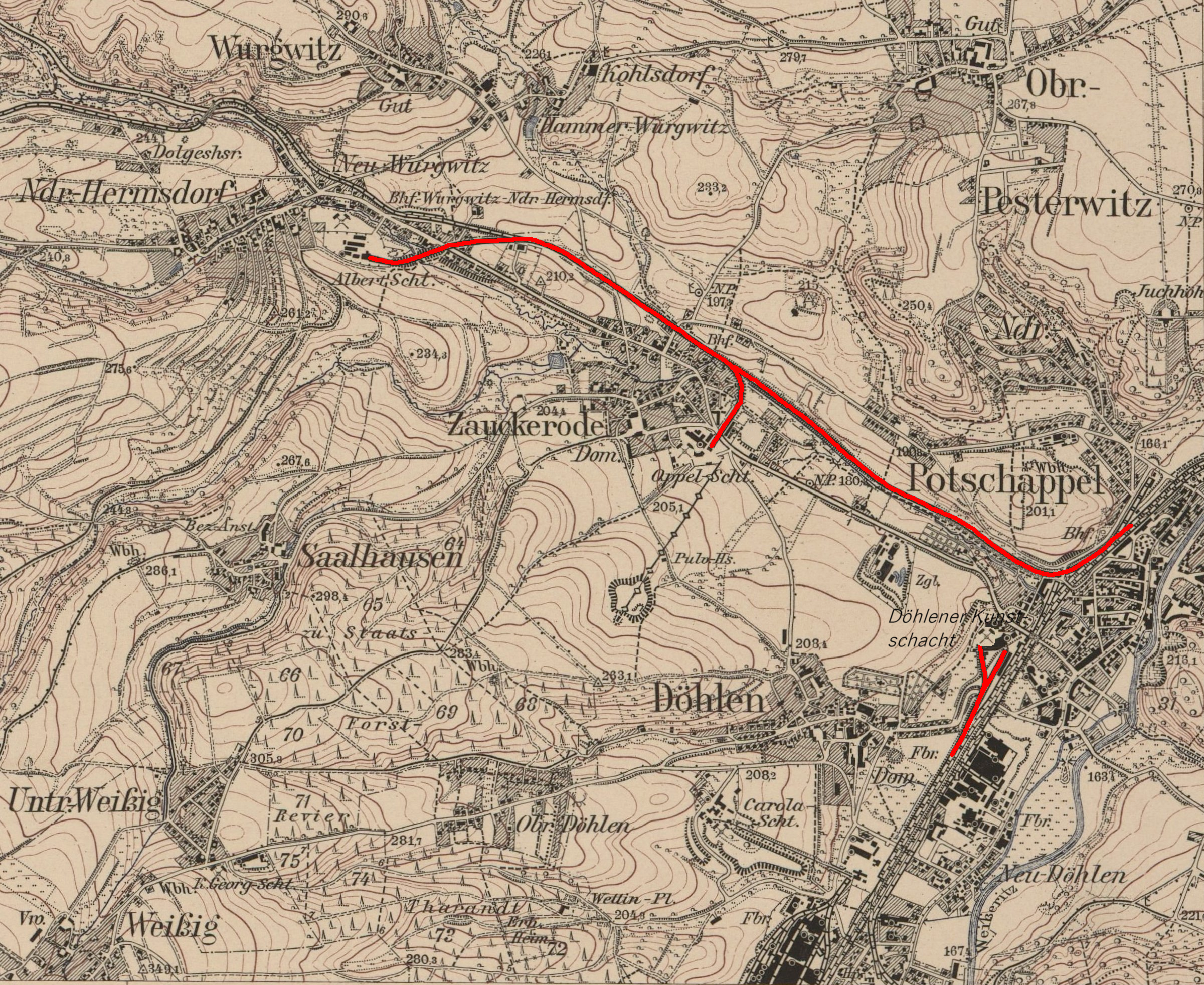 Topographische Karte (Messtischblätter) Sachsen, Ausschnitt Wilsdruff Blatt 65,1:25000,1913, Niederhermsdorfer Kohlezweigbahn.